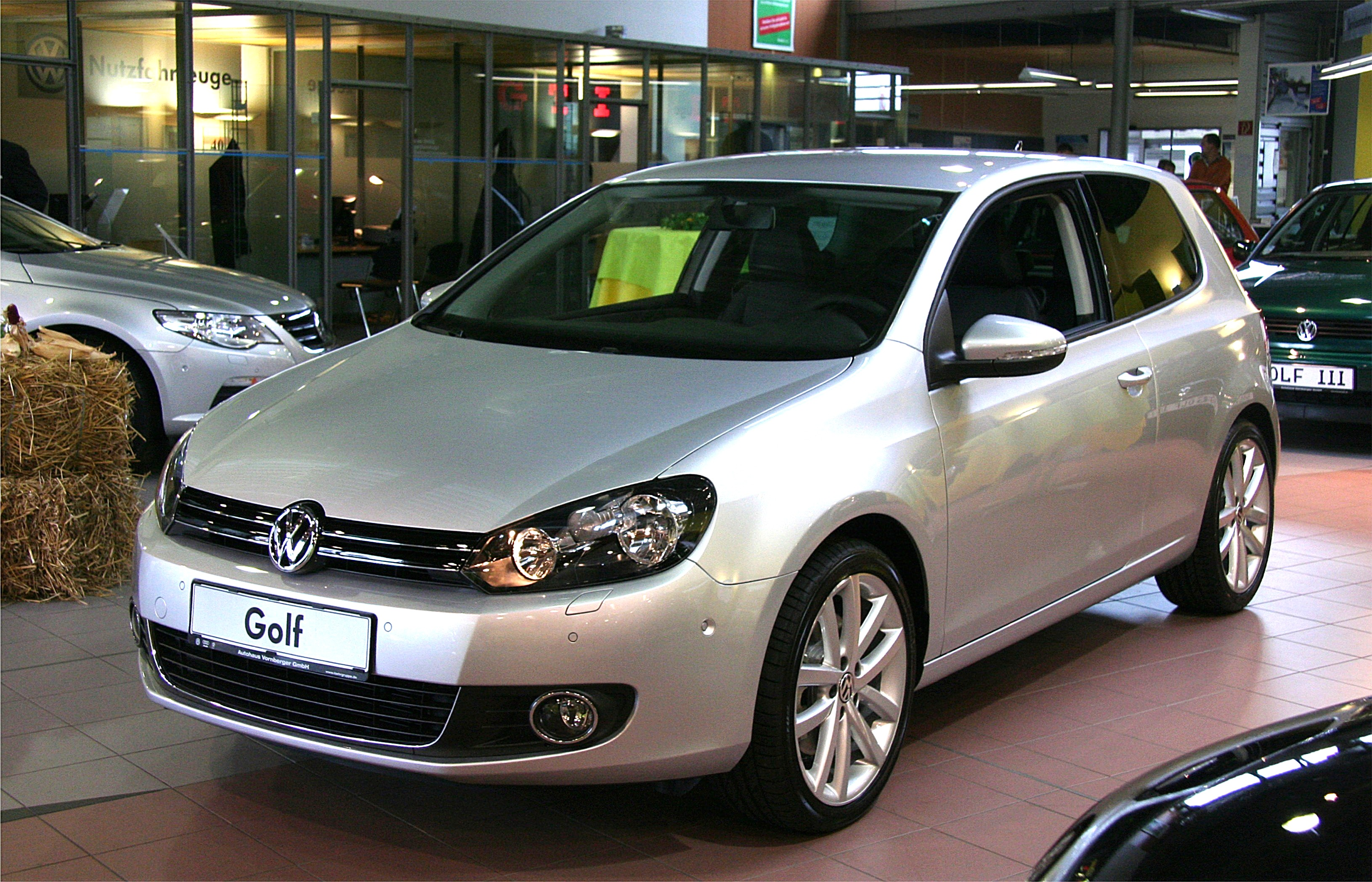 VW Golf VI TSI am 11. Oktober 2008